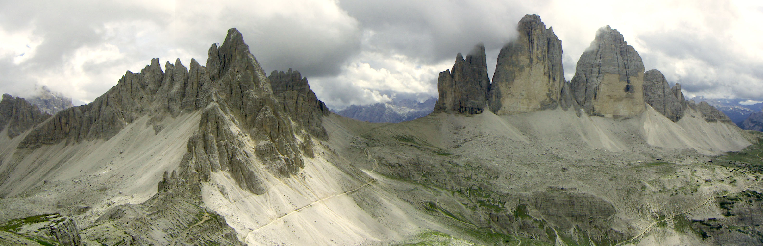 Monte Paterno e le Tre Cime di Lavaredo, Alto Adige, Italia. Uploaded first to Italian Wikipedia: Author /: Luca Lorenzi (user:Llorenzi) License / Licenza: GNU